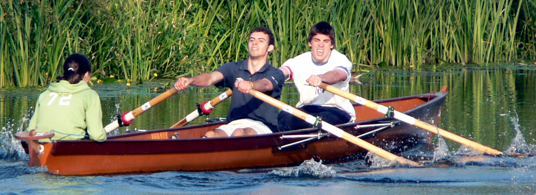 El punto de apoyo de los remos se encuentra en el agua.